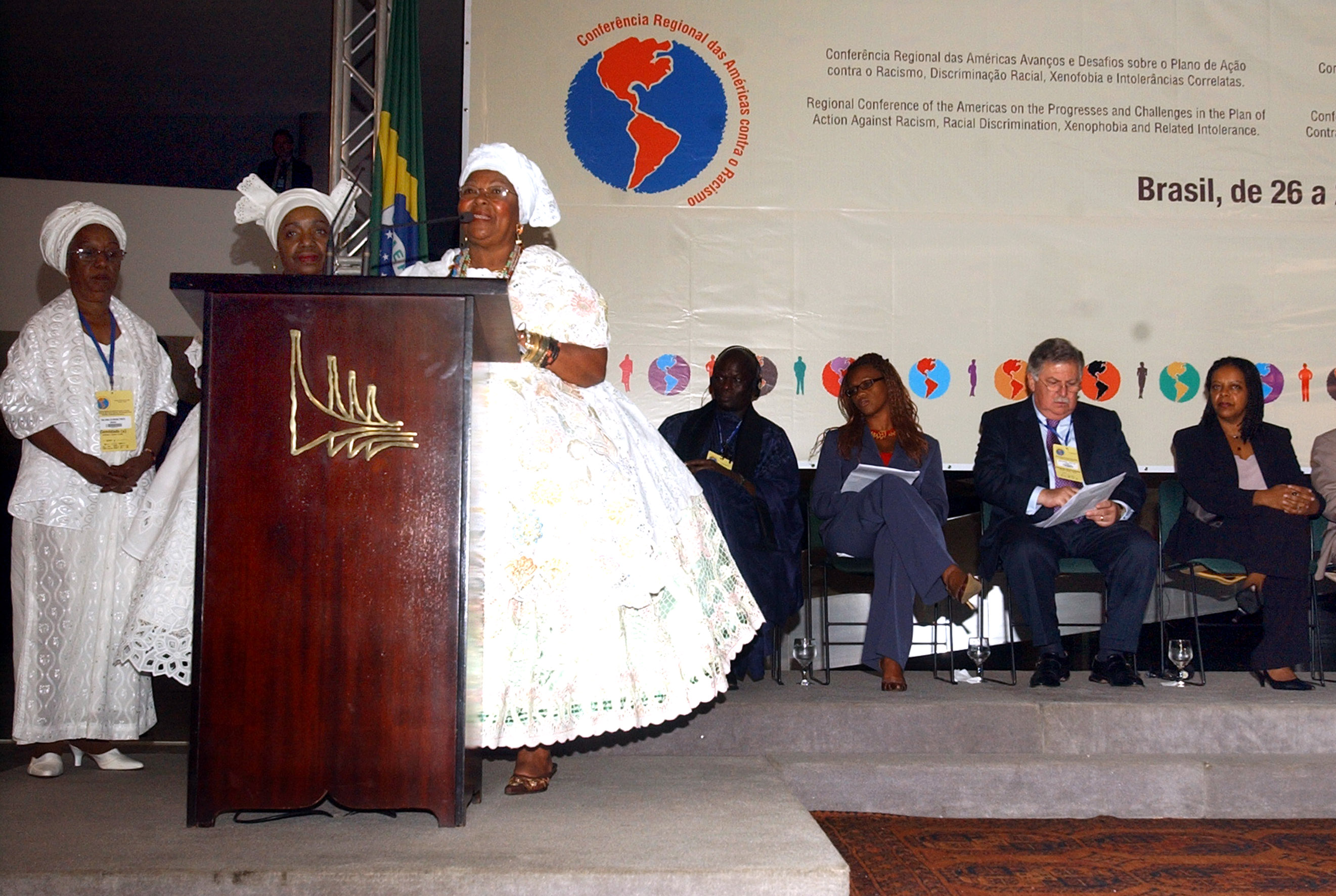 Brasília - Mães de Santo falam na Abertura da Conferência Regional das Américas sobre os Avanços do Plano de Ação contra o Racismo, a Discriminaçâo Racial, a Xenofobia e Intolerâncias Correlatas.